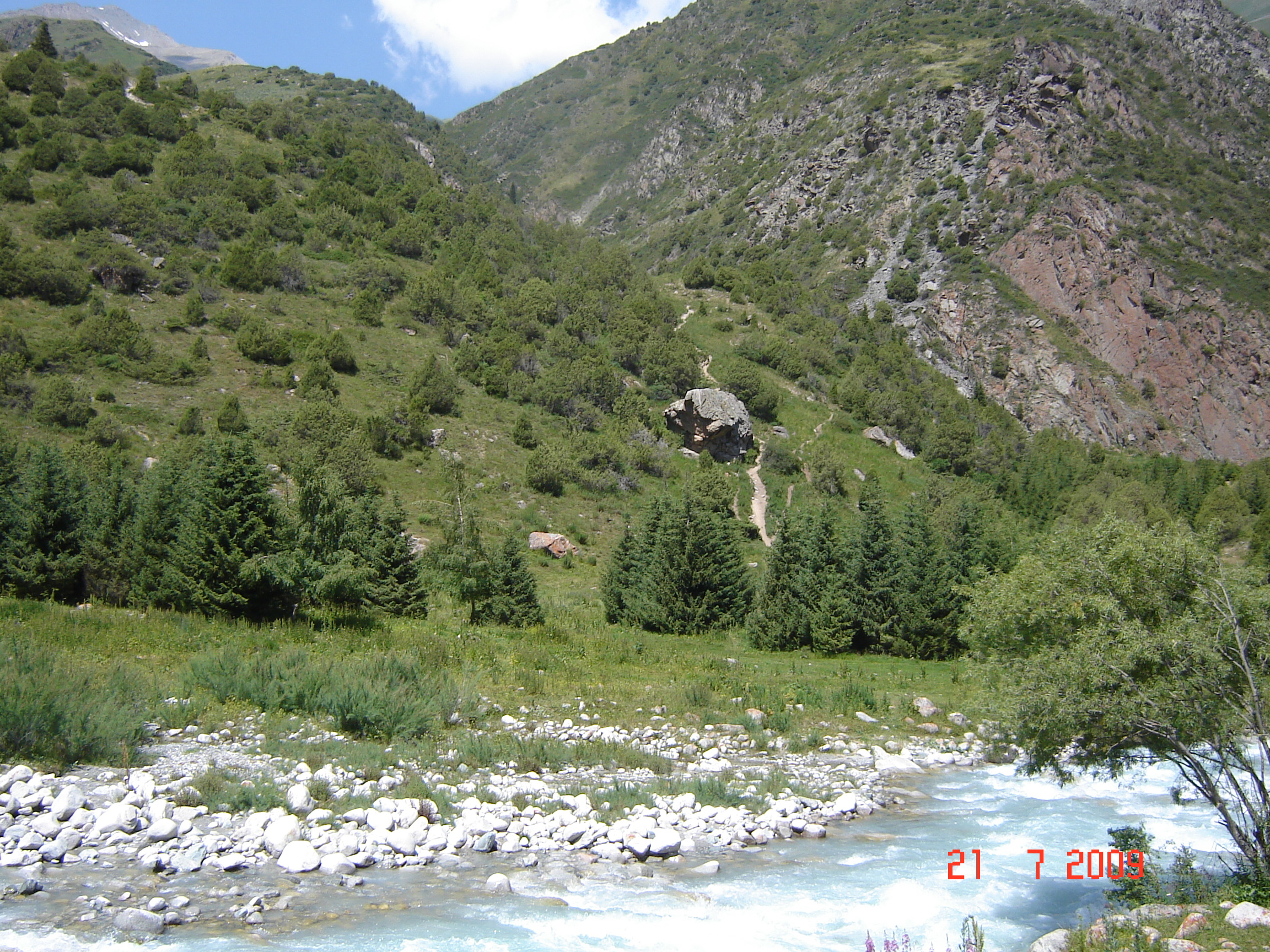 Река Ала-Арча в парке Ала-Арча(Киргизия)